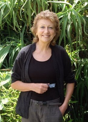 Bild von Christine Niklas